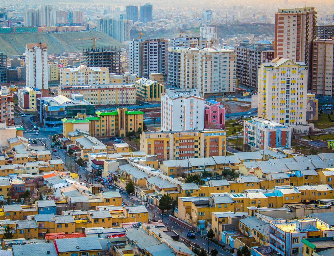 شهرک رشدیه در تبریز-عکاس : حامدرضایی.